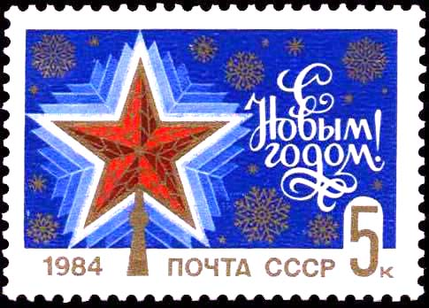 Марка "С Новым Годом!", 1984 год, Почта СССР